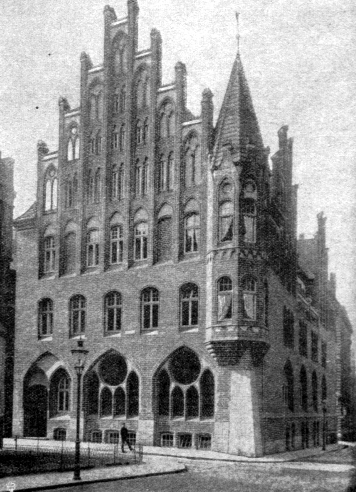 Das Kirchhaus der St. Marienkirche von Osten gesehen